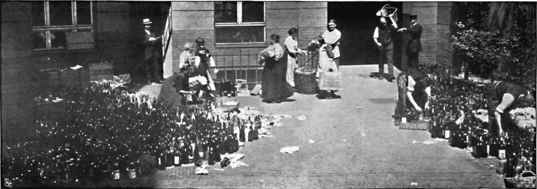 Auf dem Hof der Sammelstelle für Liebesgaben in der Luisenstraße zu Berlin.